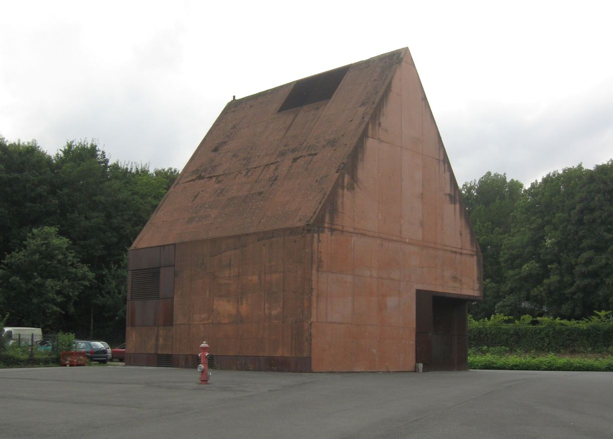 Zentrale Feuer- und Rettungswache 2 (ZFRW Gelsenkirchen) an der Seestraße: aktuelle Gelsenkirchener Hauptfeuerwache (Einweihung 2005). Brandhaus.